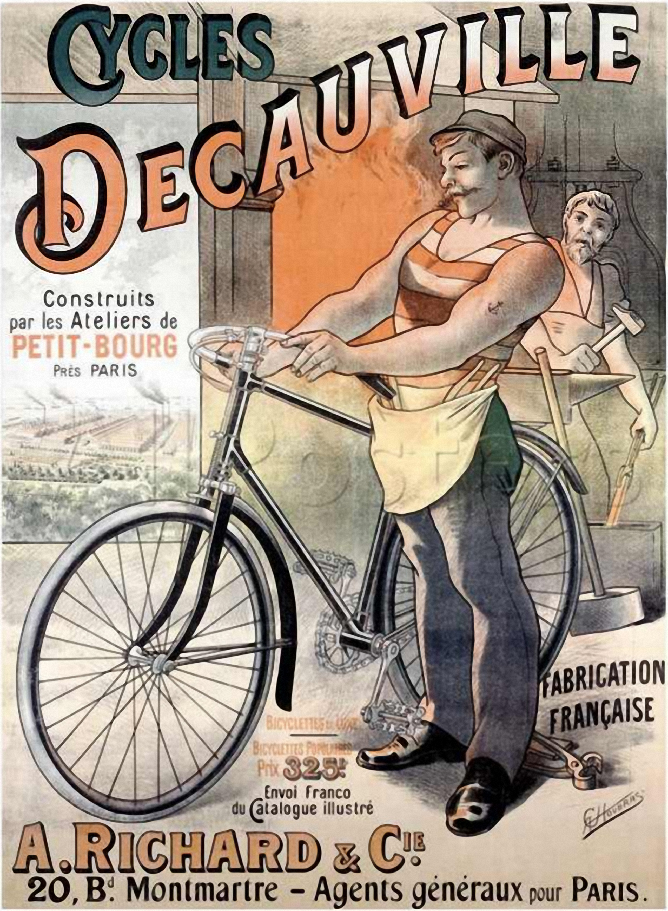 Werbeplakat für Fahrräder der Marke Decauville